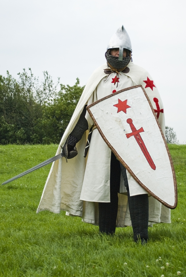 Rycerz w barwach Zakonu Braci dobrzyńskich